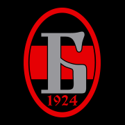 Емблема на отбора